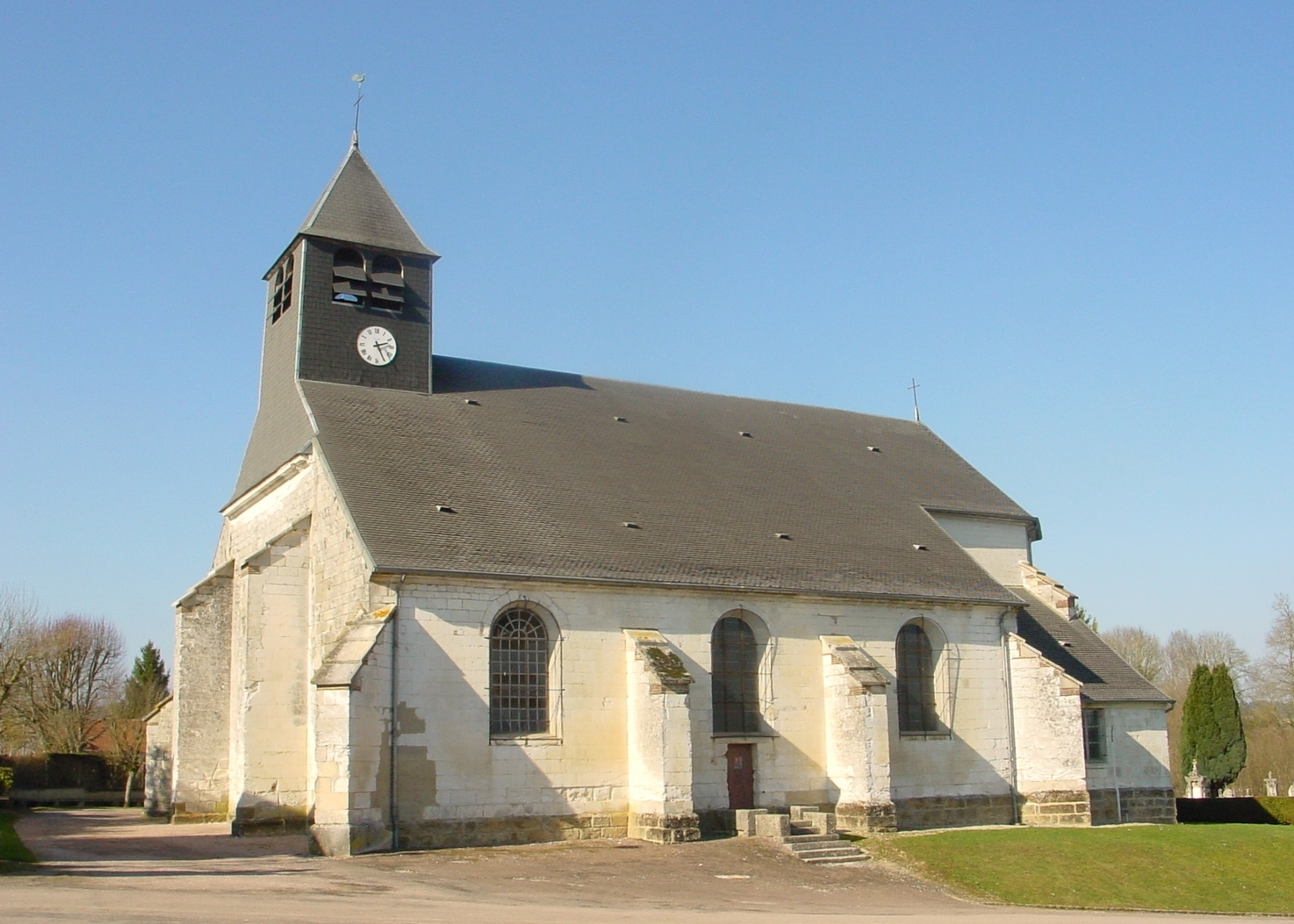 La face sud de l'église, février 2013.